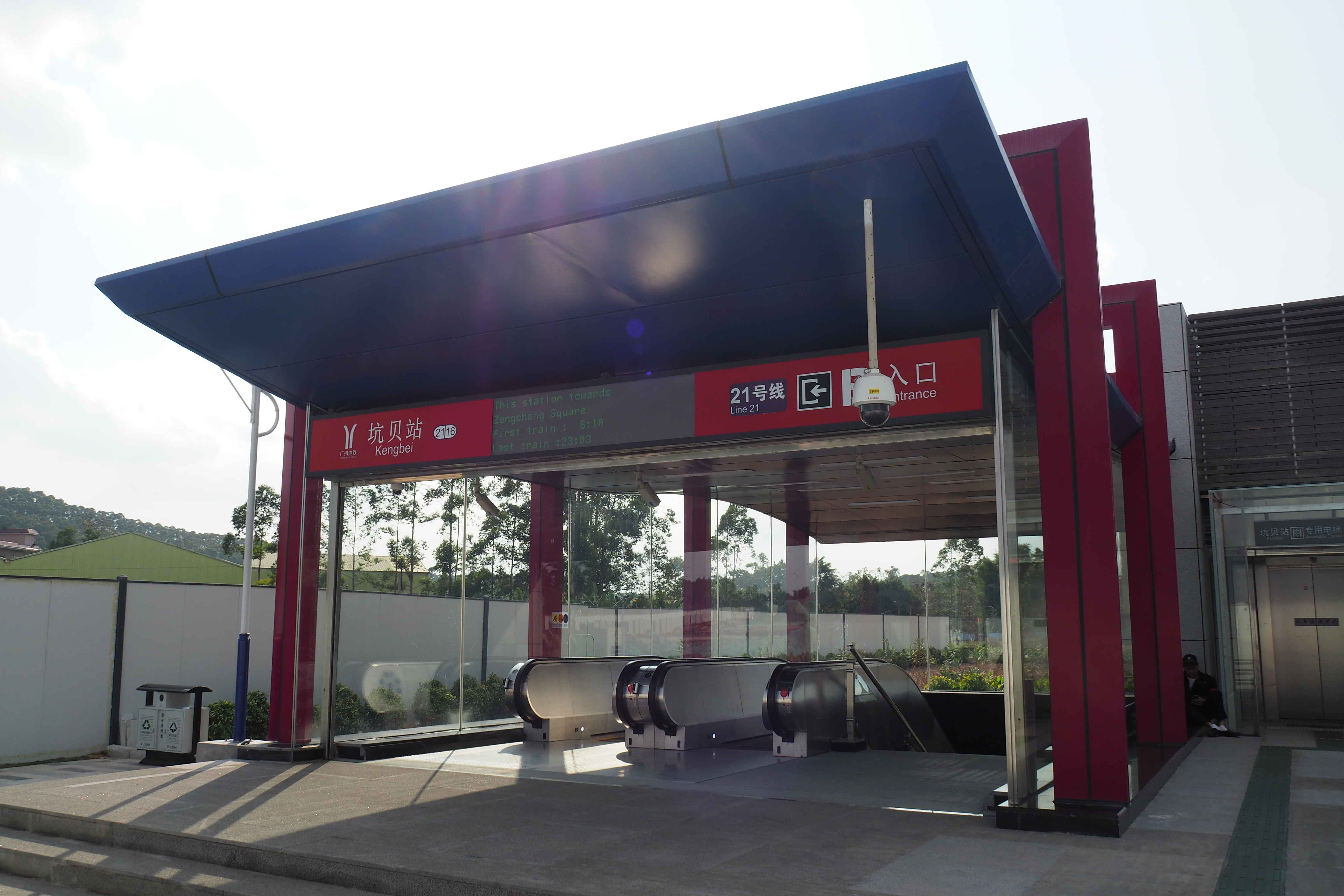 中文（中国大陆）: 广州地铁21号线坑贝站B入口。